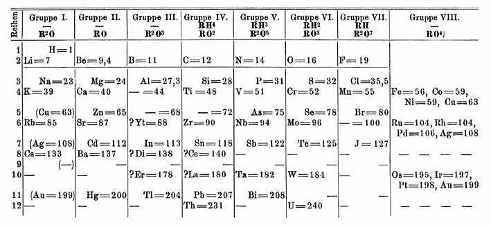 Graphik aus: Mendelejeff: Die periodische Gesetzmäßigkeit der Elemente. In: Annalen der Chemie und Pharmacie. VIII. Supplementband 1871, S. 133–229